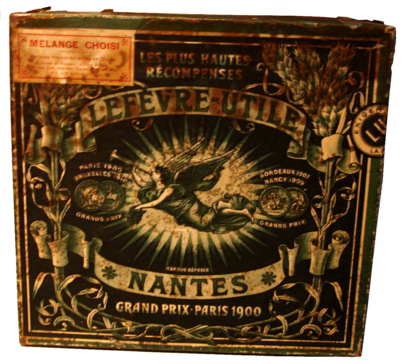 Boite en fer blanc contenant des biscuits LU de 1910 - photo prise au Musée du château des ducs de Bretagne de Nantes